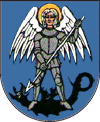 Herb Płazowa